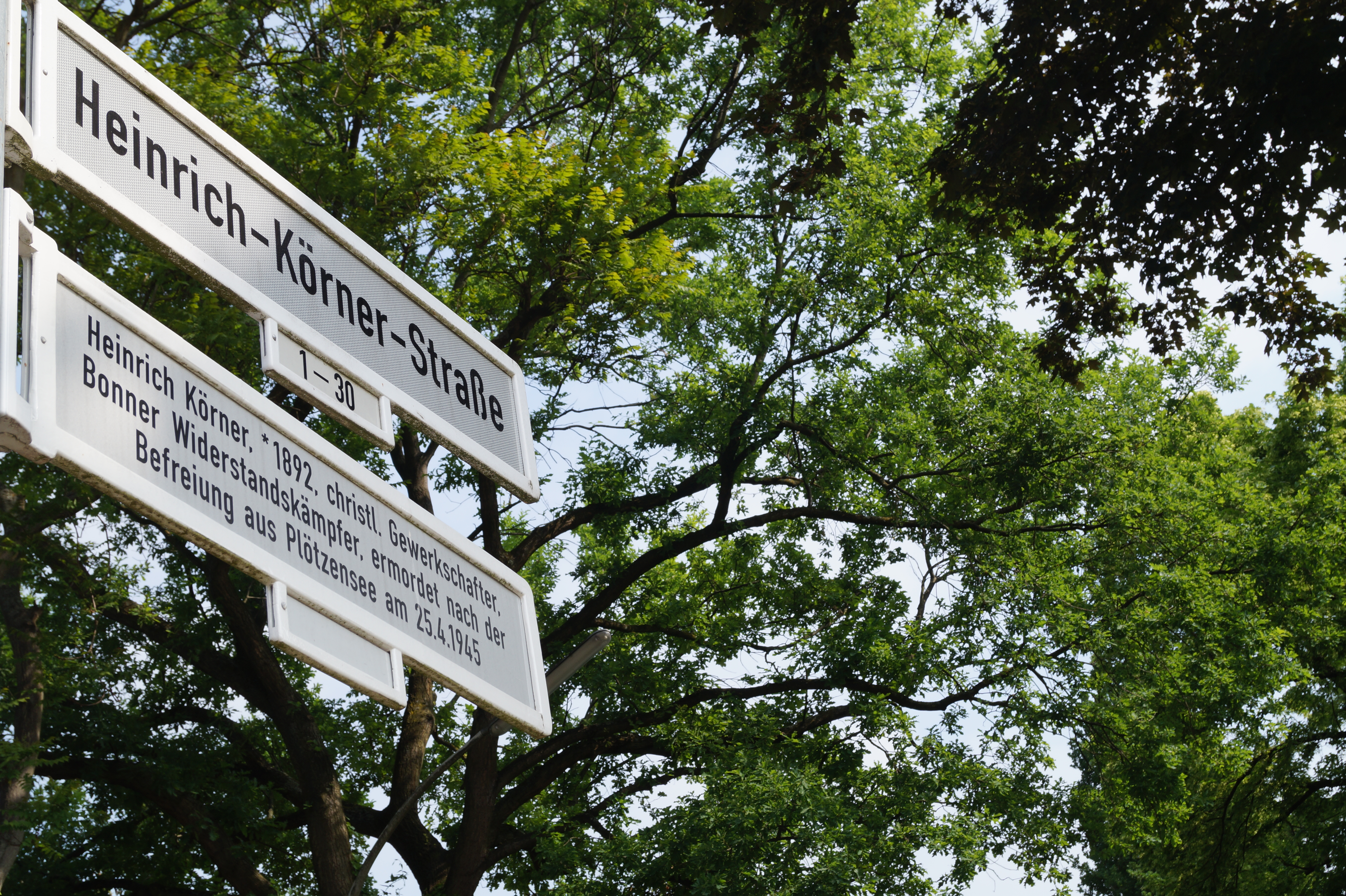 Straßenschild in der Bonner Reutersiedlung zu Ehren von Heinrich Körner (1892-1945), christlicher Gewerkschafter und NS-Widerstandskämpfer